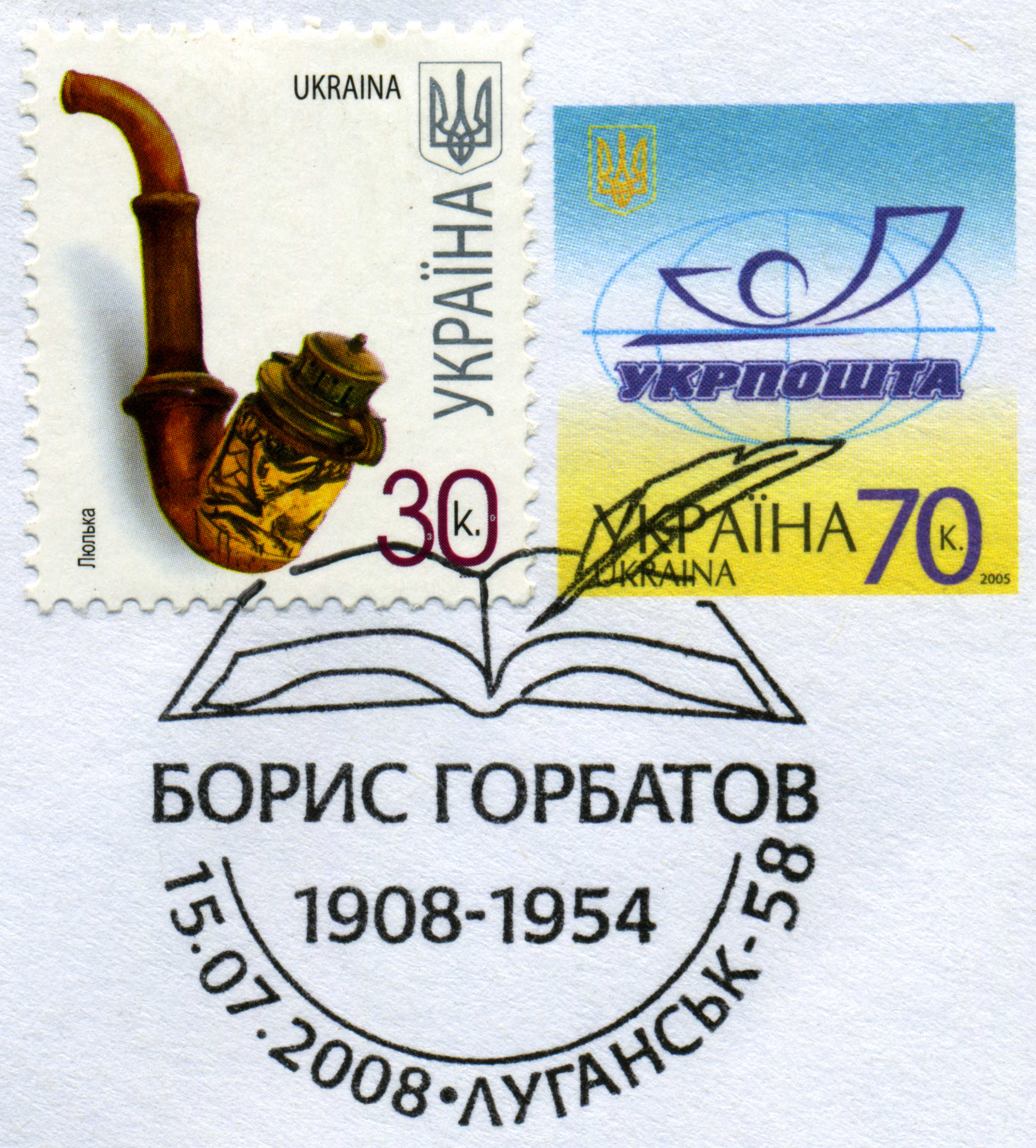 Луганск. Спецгашение к столетию со дня рождения Бориса Горбатова